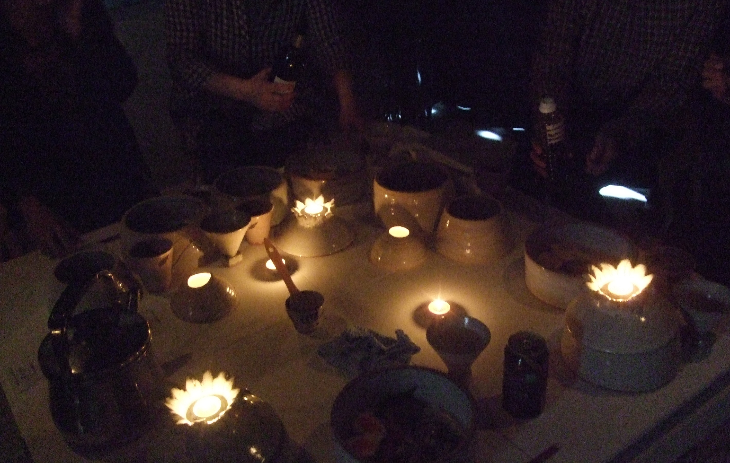 アートレストラン2013年食をテーマに企画